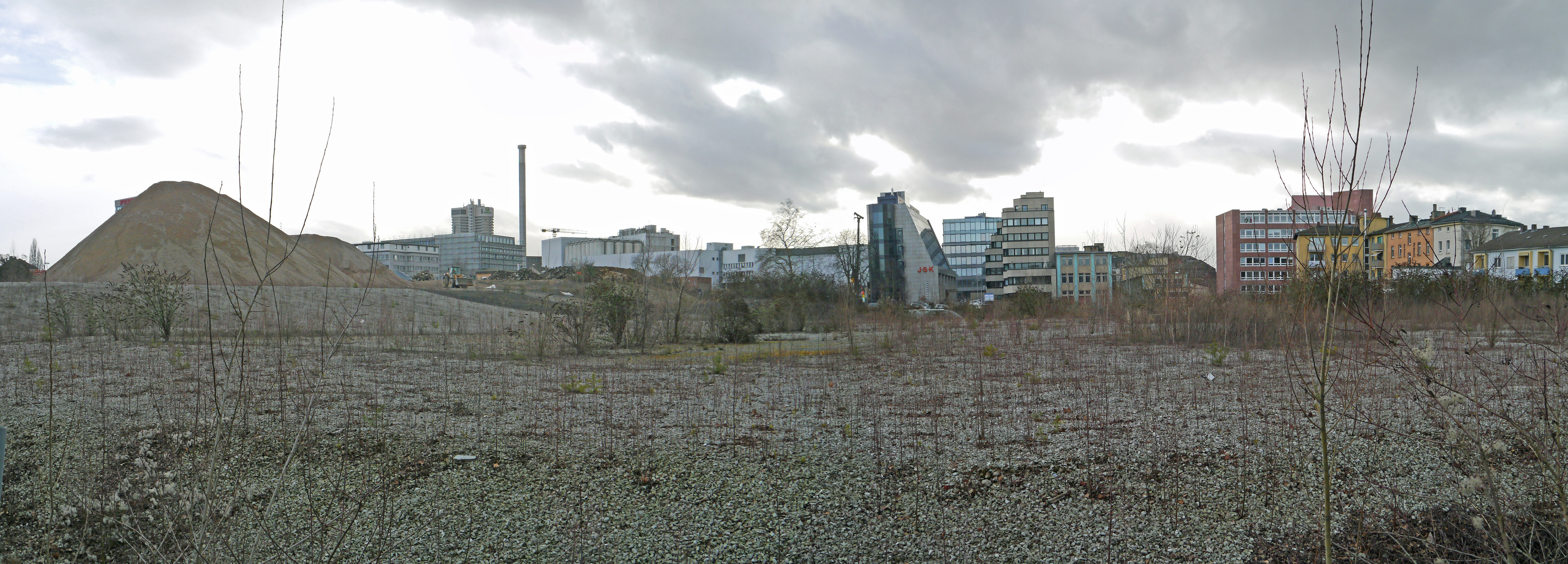 Das ehemalige Henninger Bräu-Gelände mit dem Standort des abgerissenen Henninger-Turmes. Auf beiden Seiten des Hainer Weges. 2014 in Frankfurt am Main - Sachsenhausen.